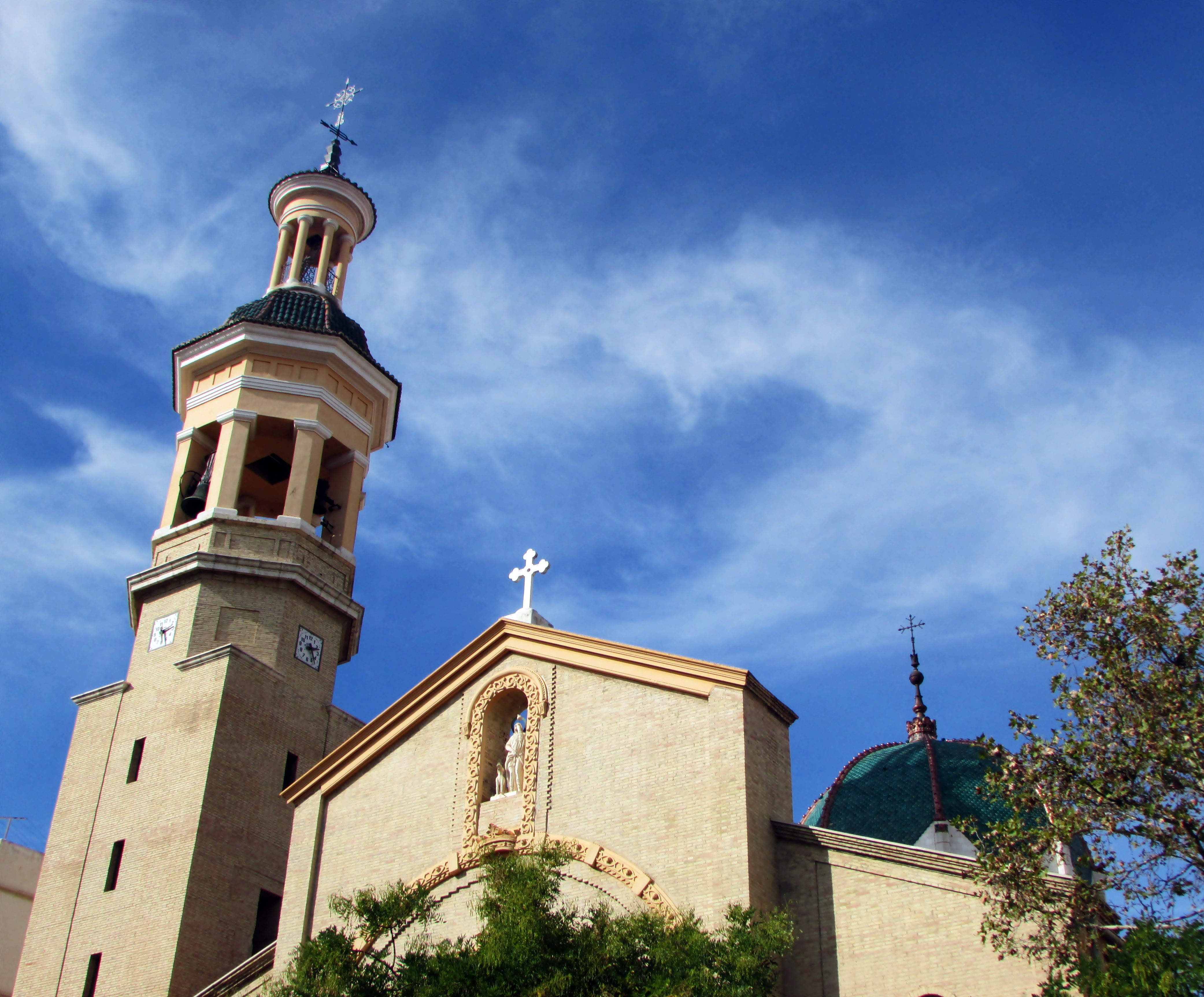 Iglesia parroquial de San Roque de Benicalap 15.250-272.